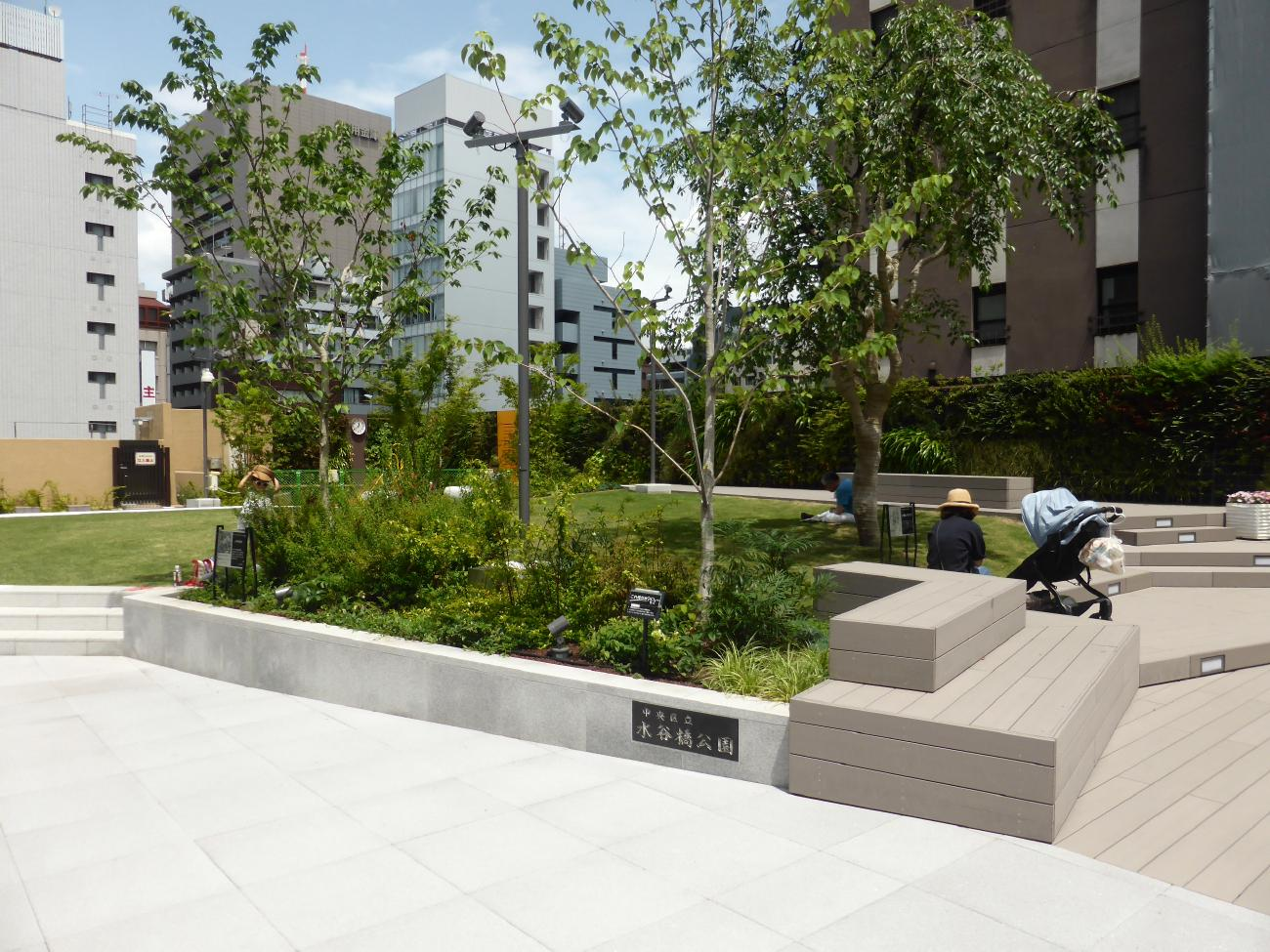 東銀座出口沿いにある水谷橋公園は4F